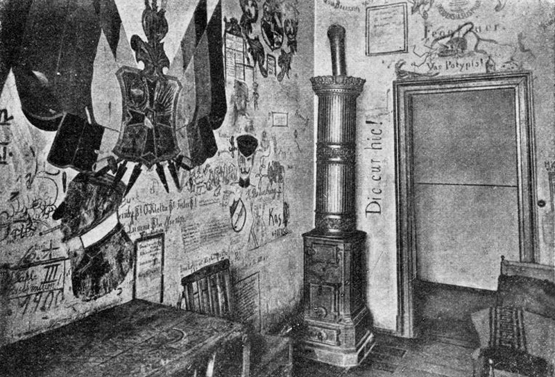 Der Karzer der Universität Leipzig im ehemaligen Senatsgebäude vor 1892